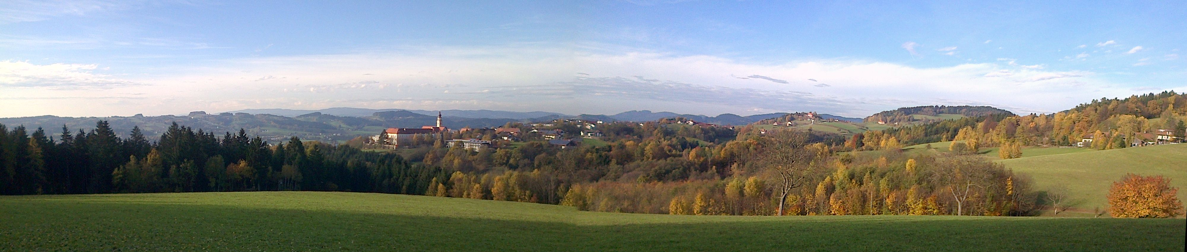 Panorama von Windberg